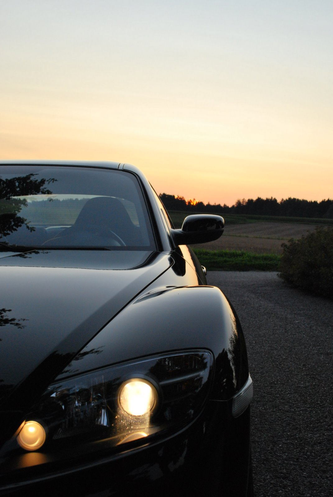 Mazda RX-8